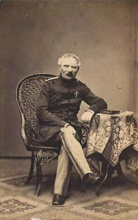 Ole "Oluf" Krabbe (1789-1864), Danish General